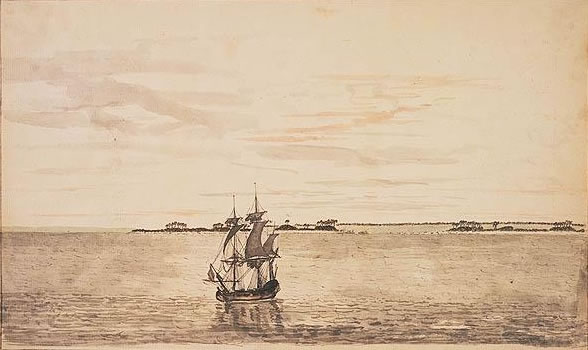 Passage de la Resolution du Capitaine Cook le 16 juin 1774 sur l'atoll de Palmerston aux îles Cook (Cook Islands)